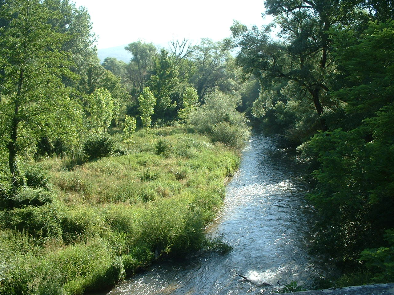 Un'ansa del fiume Sangro presso Ateleta. Foto personale. Licenza